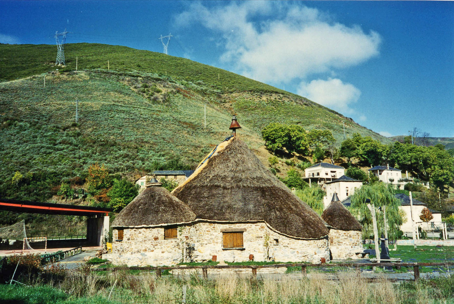 Palloza (teito de paja) en el municipio de Balboa, comarca de El Bierzo, León, España. (Fotografía en papel)